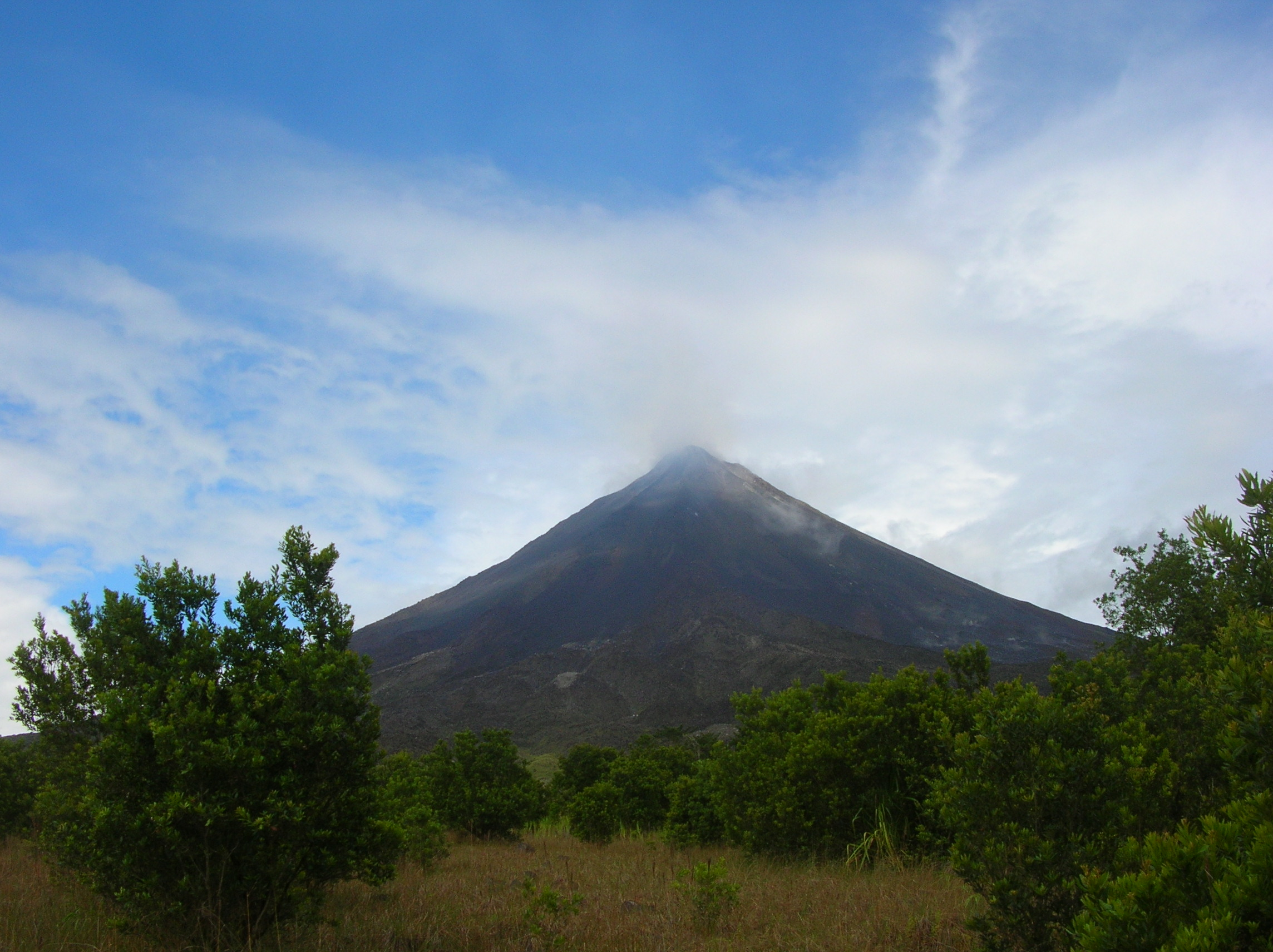 Volcan Arenal vu de l'intérieur du parc protégé